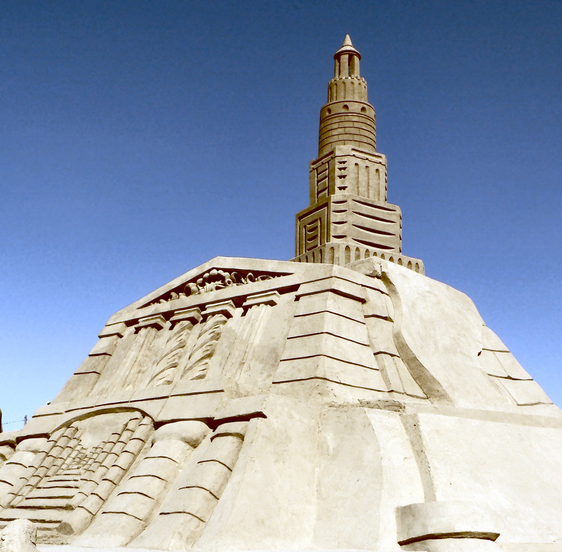 Escultura em areia Farol de Alexandria Lighthouse sand sculpture in Pera, Algarve - FIESA 2007